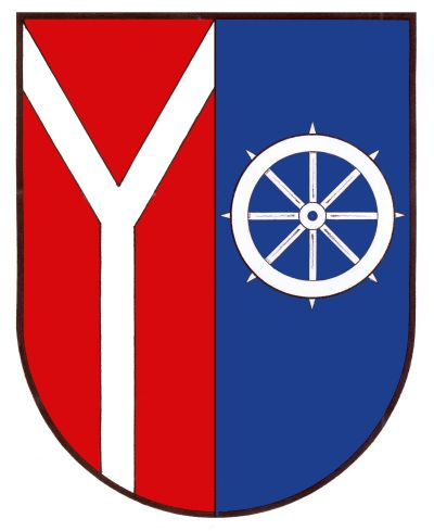 Chotěvice - znak / Chotěvice - coat of arms